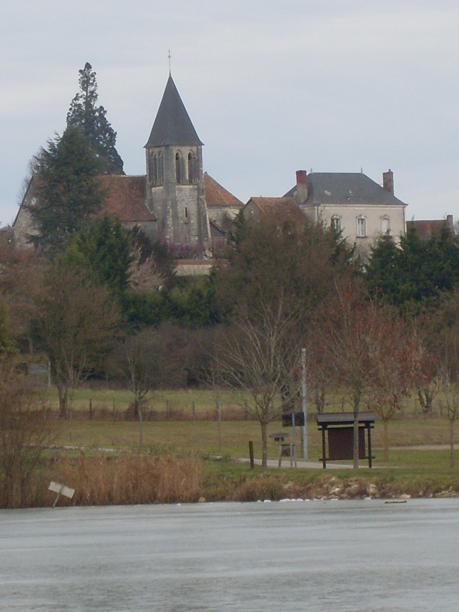 Aperçu Pellevoisin, commune Française